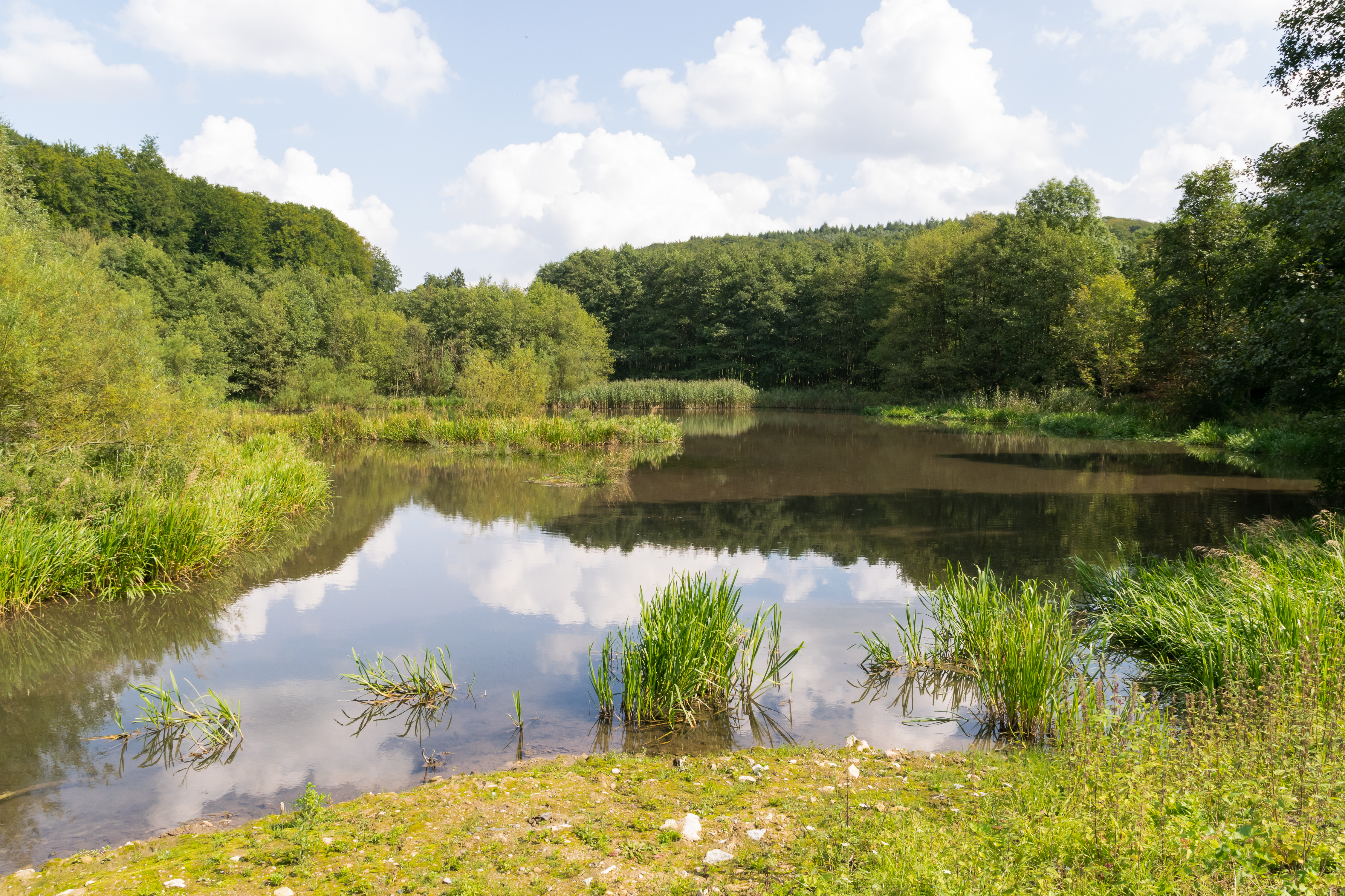 Stauteich an der Amerunger Kapelle im Naturschutzgebiet Marschallshagen und Nonnenholz mit oberen Altenautal, Lichtenau, Kreis Paderborn